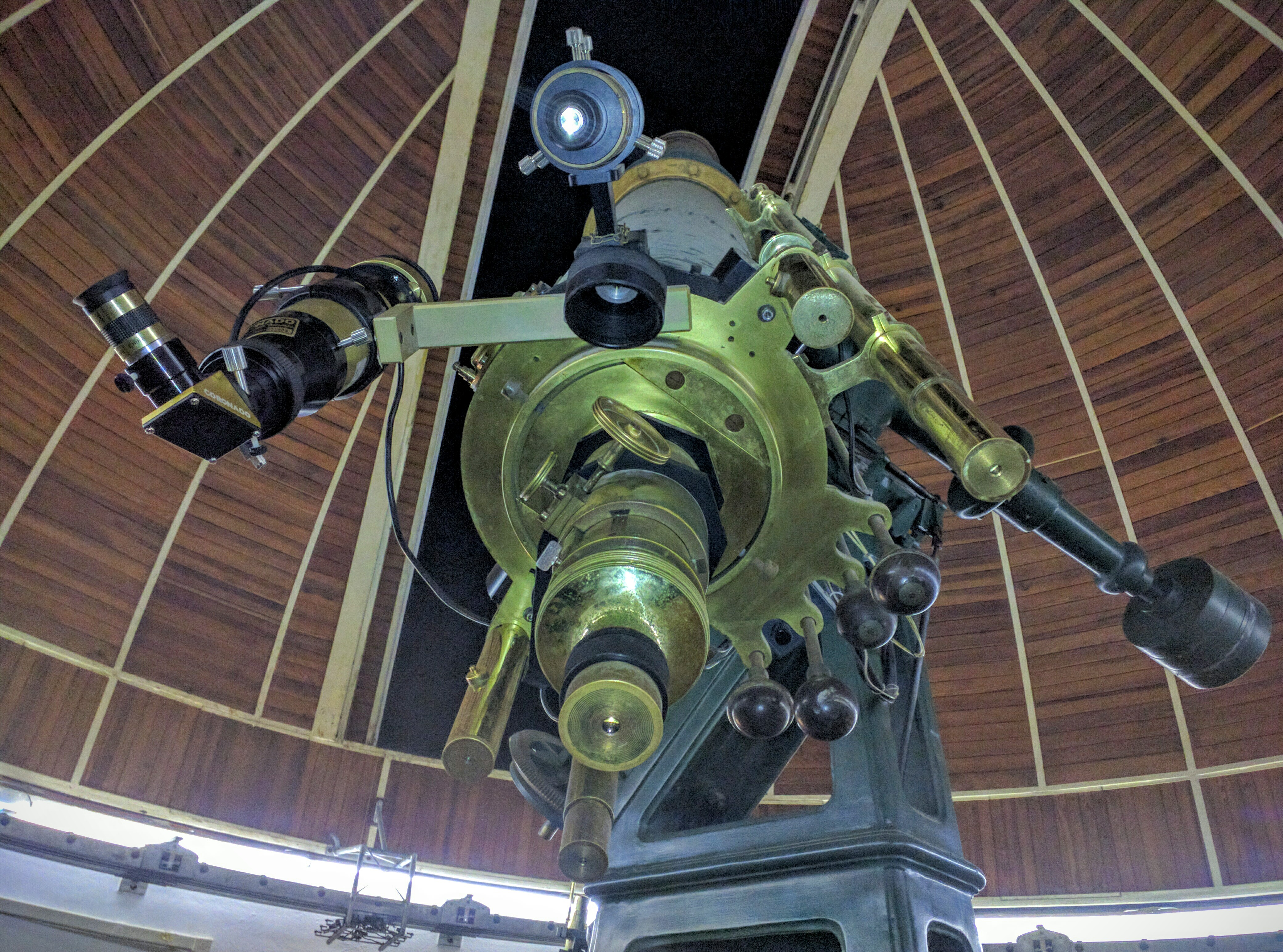 Arcetri, telescopio